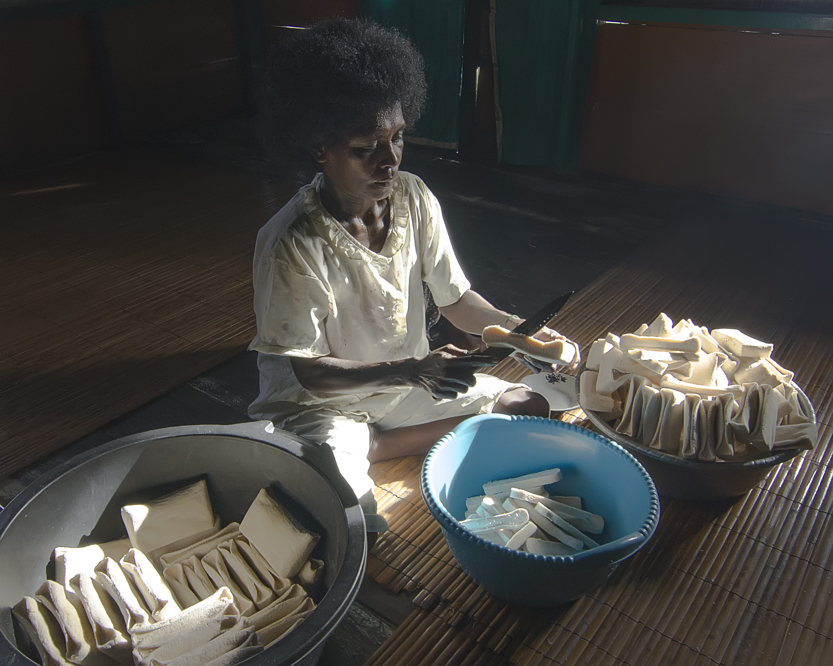 Sagu Merupakan Makanan Khas Papua, Yang Biasa Di Jadikan Papeda